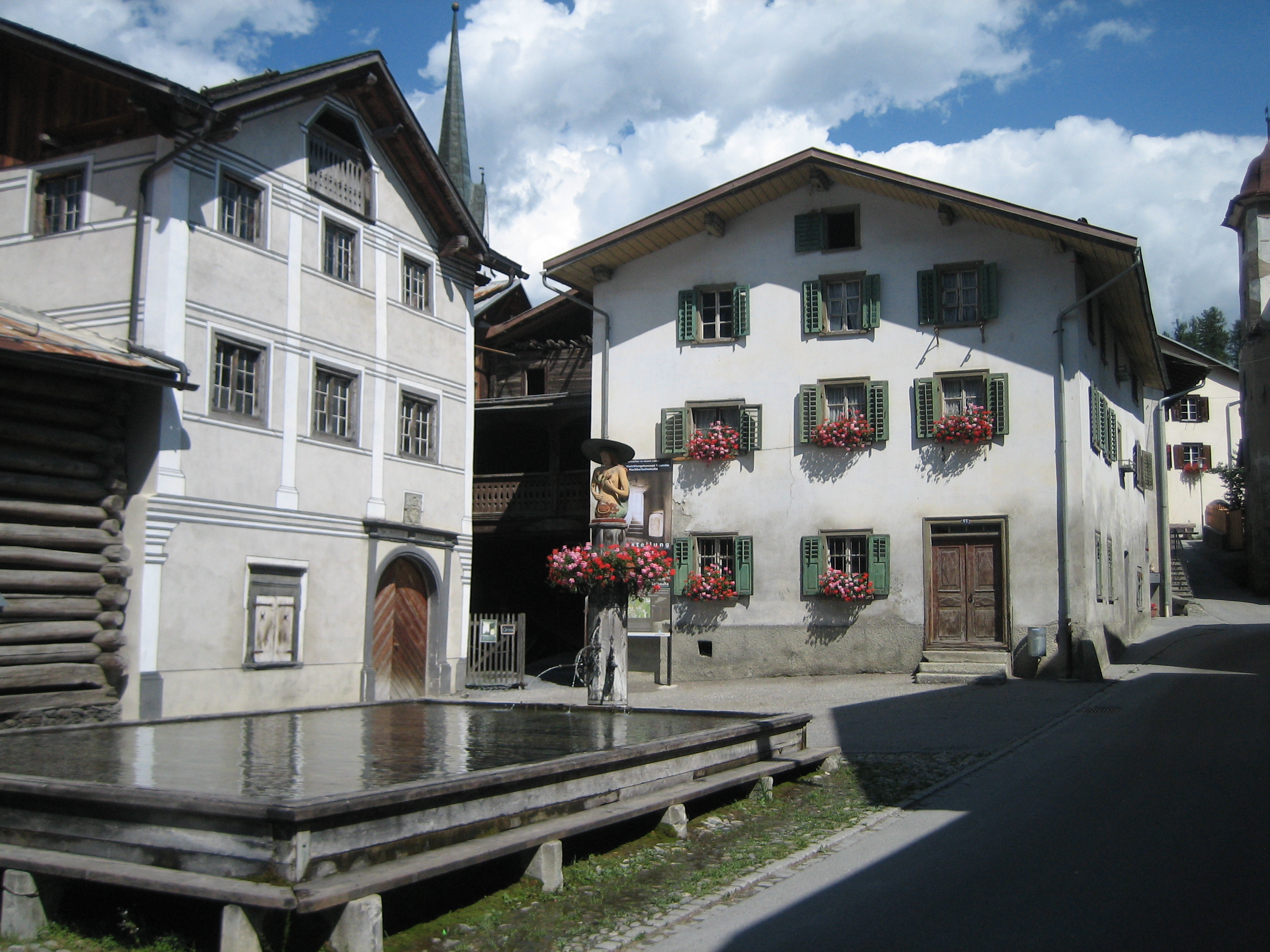 Brunnen in Valendas